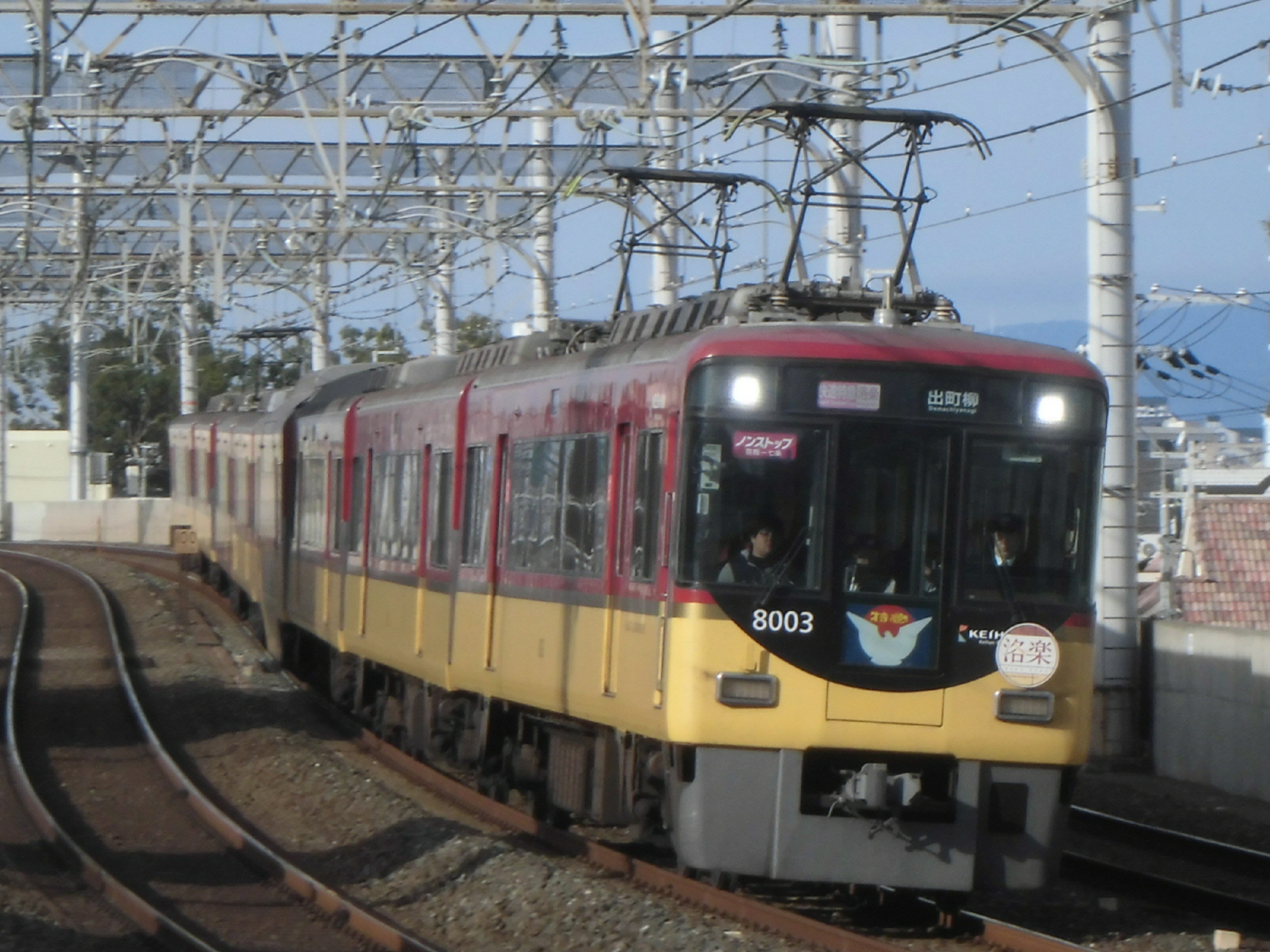 京阪8000系8003F